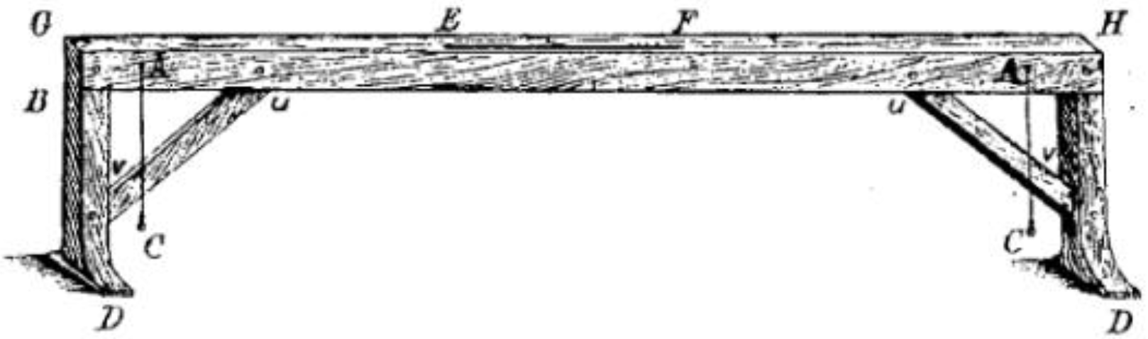 Reconstitution par Isaac Newton du chorobate romain, instrument servant à vérifier la pente, notamment dans la réalisation des aqueducs.